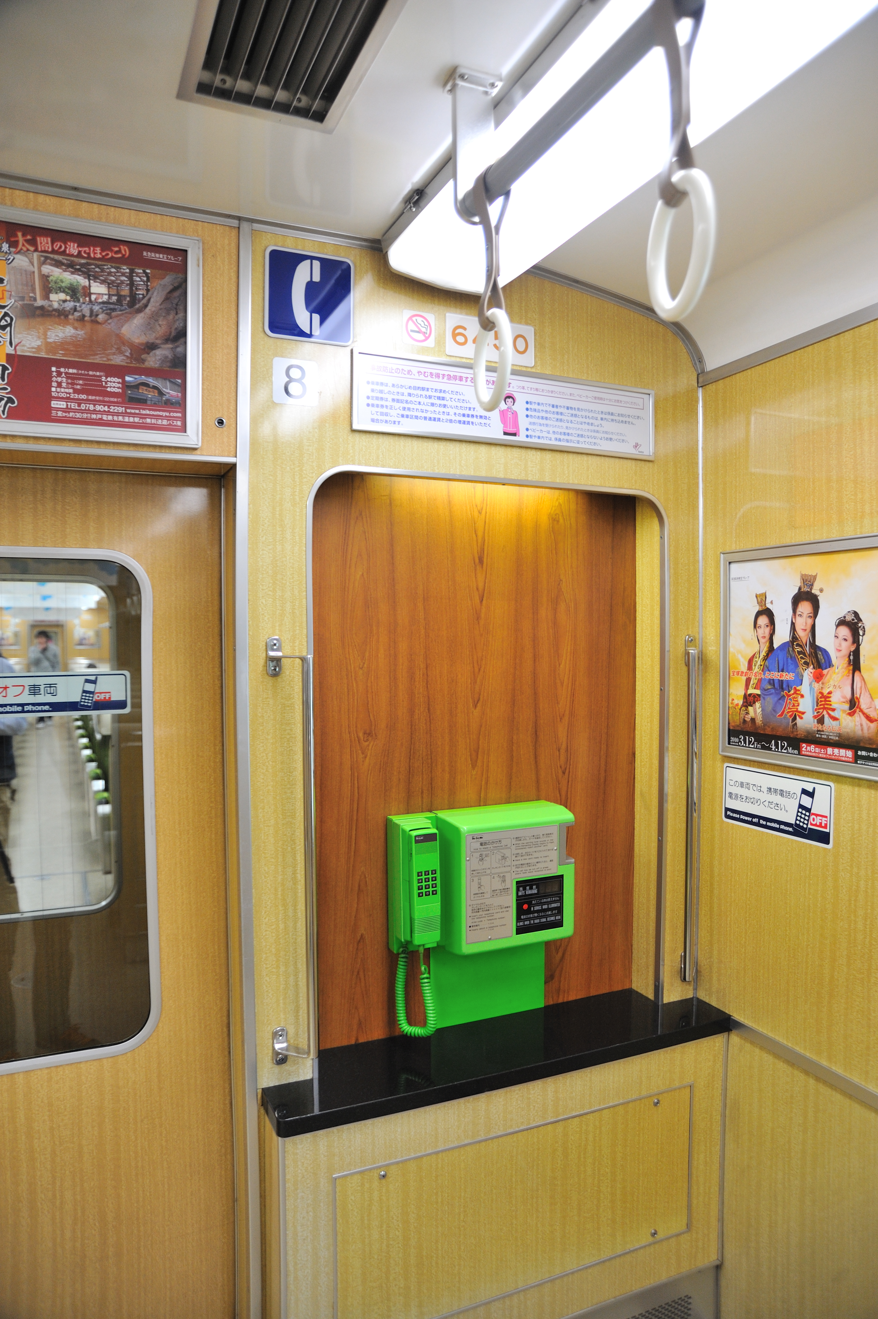 6450 車内電話